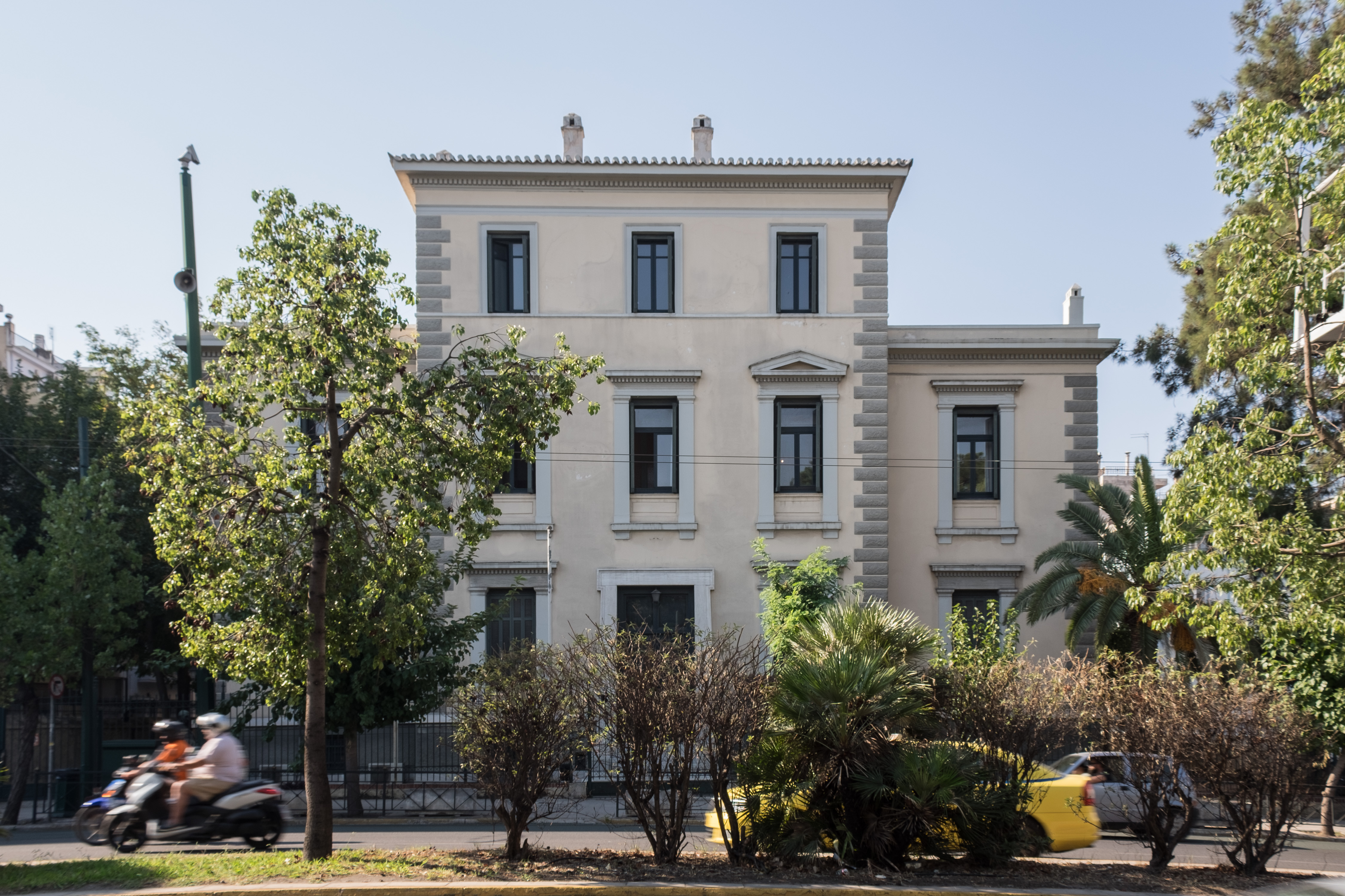 Αυστριακό Αρχαιολογικό Ινστιτούτο«Αυστριακό Αρχαιολογικό Ινστιτούτο»